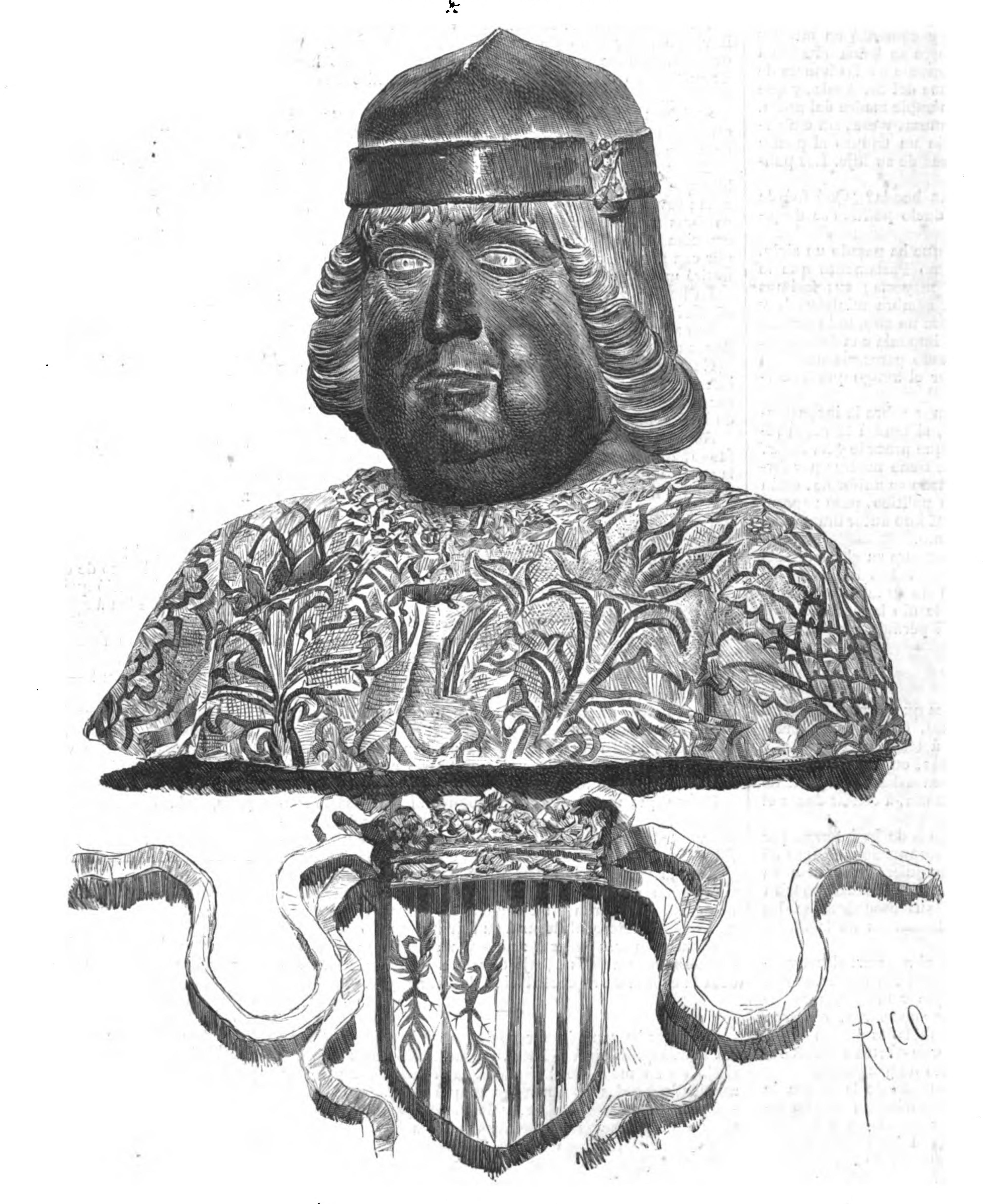 Fernando I de Aragón (el de Antequera). Busto coetáneo, en bronce, existente en el Museo Nacional de Nápoles. (Dibujo de D. Martín Rico.).